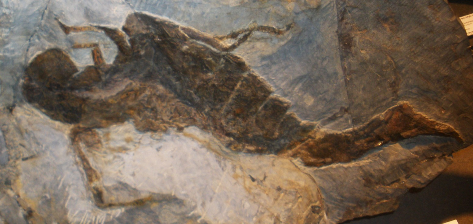 Fossil of Jaekelopterus, an extinct arthropod- Took the photo at Fossil Show, Munchen 2011